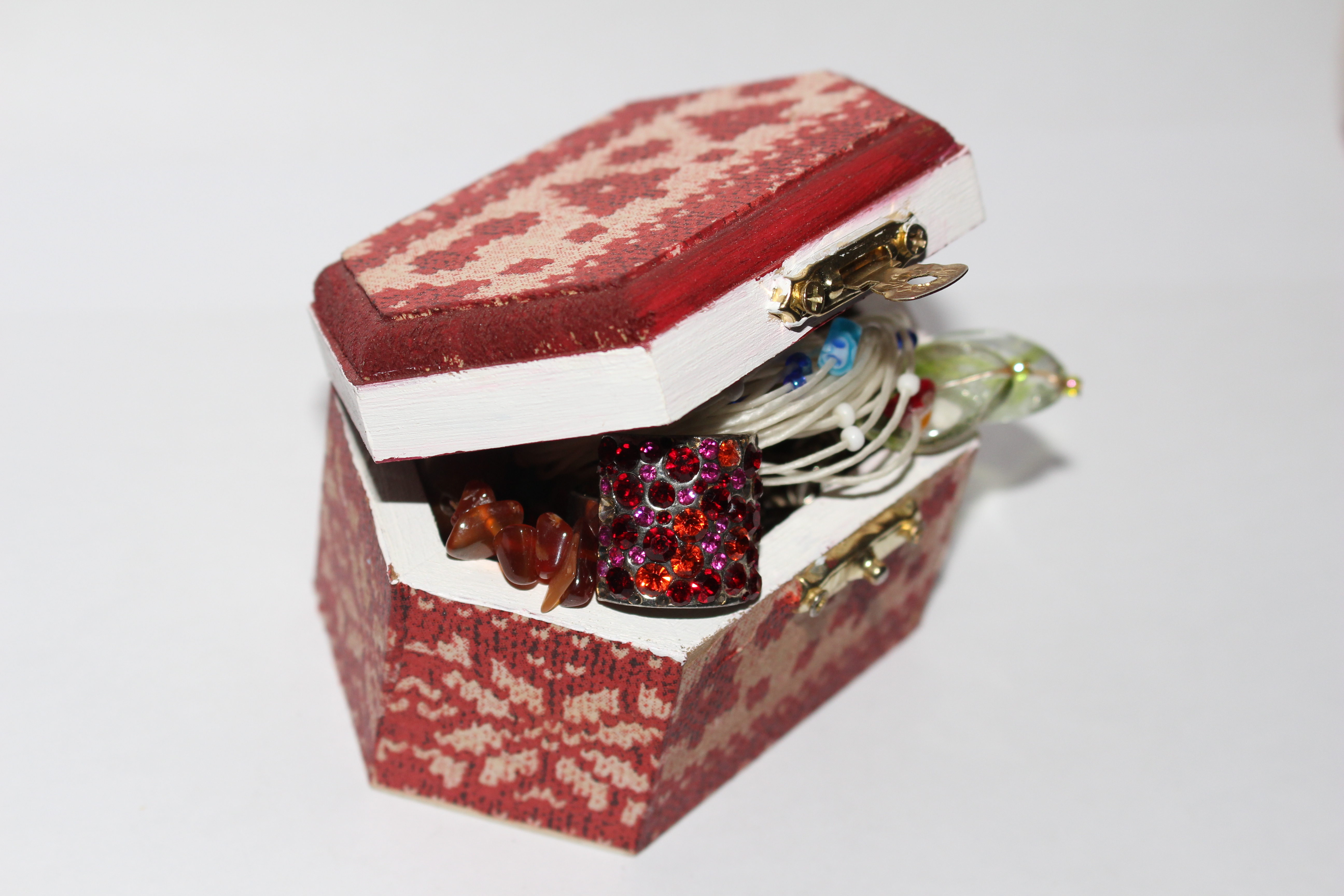 bizhuteri